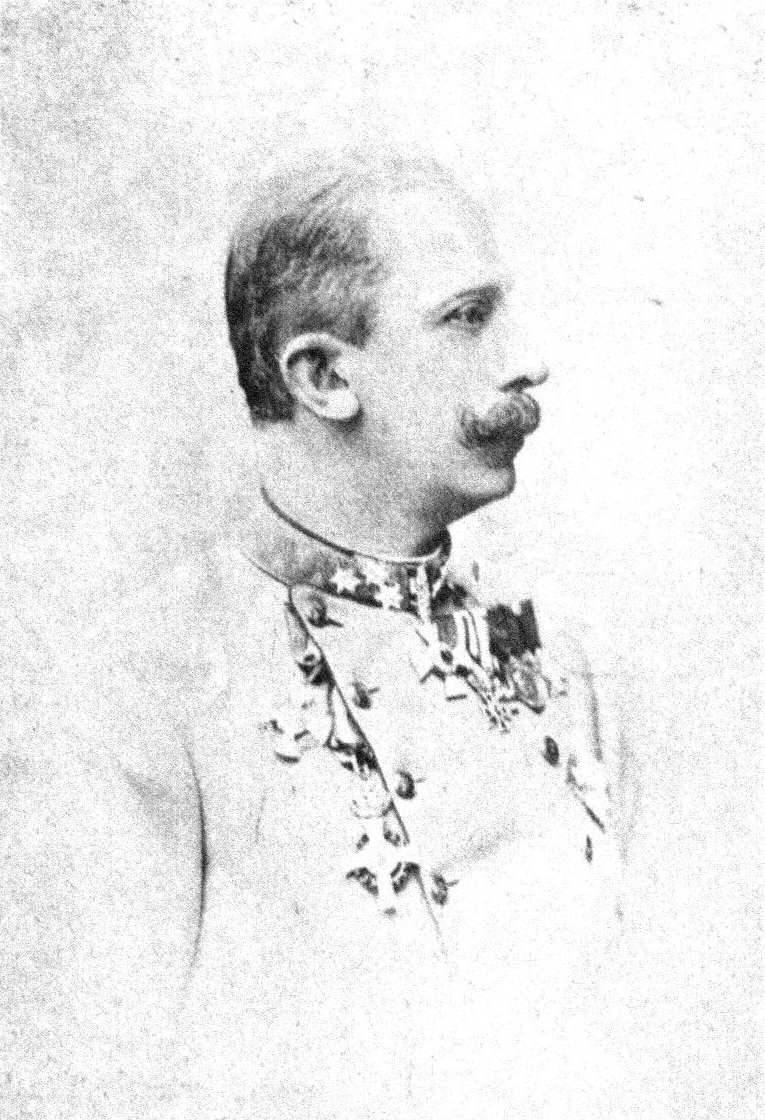 Franz von Schönaich (1844-1916), Austrian general and politician